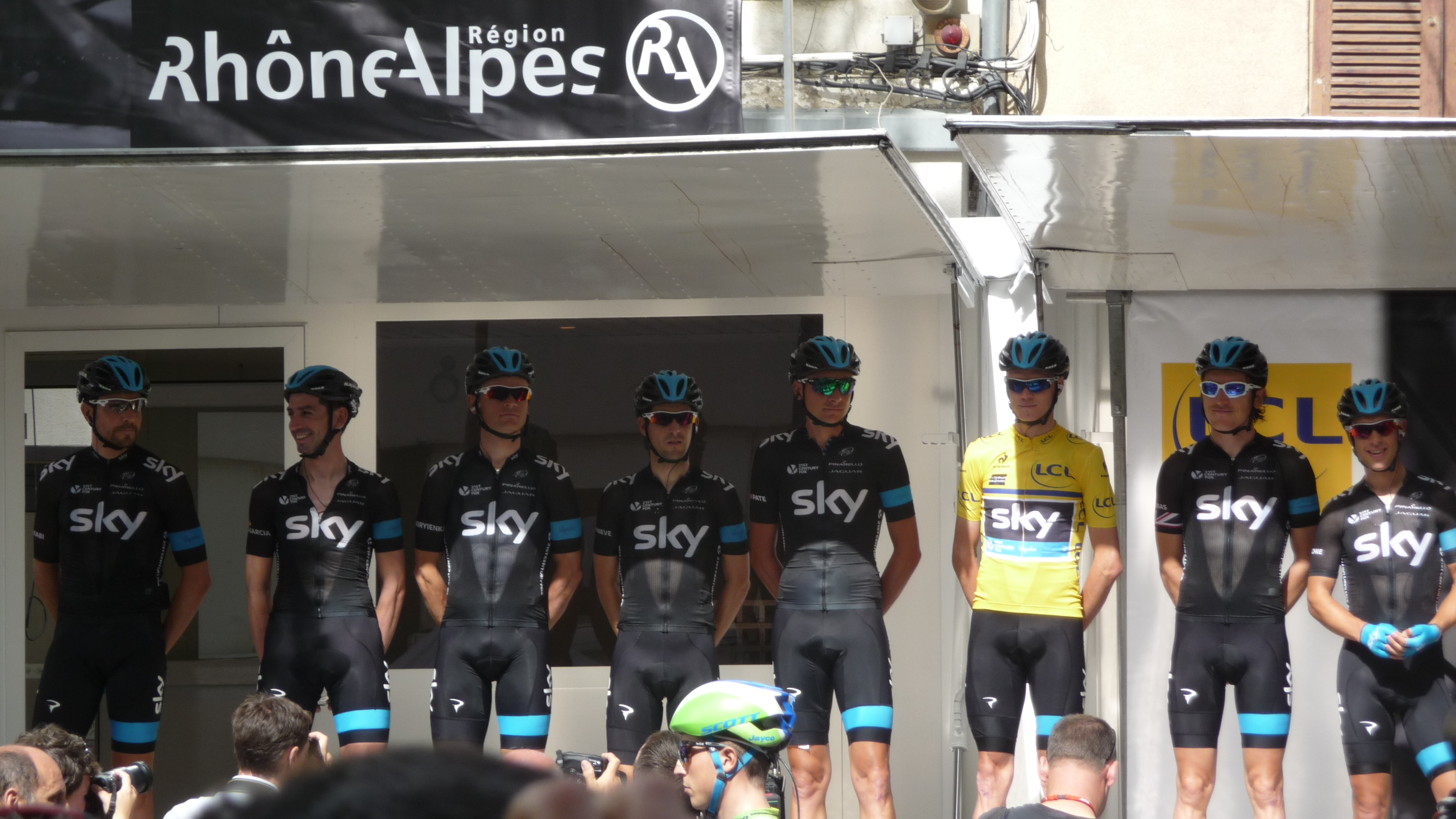 Présentation des équipes du Critérium du Dauphiné 2014 lors du départ de la 2ème étape à Tarare.